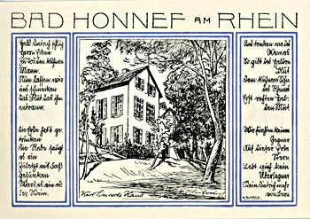 Heinrich Reifferscheid, Karl Simrocks Haus Haus Parzival, Notgeld für Bad Honnef